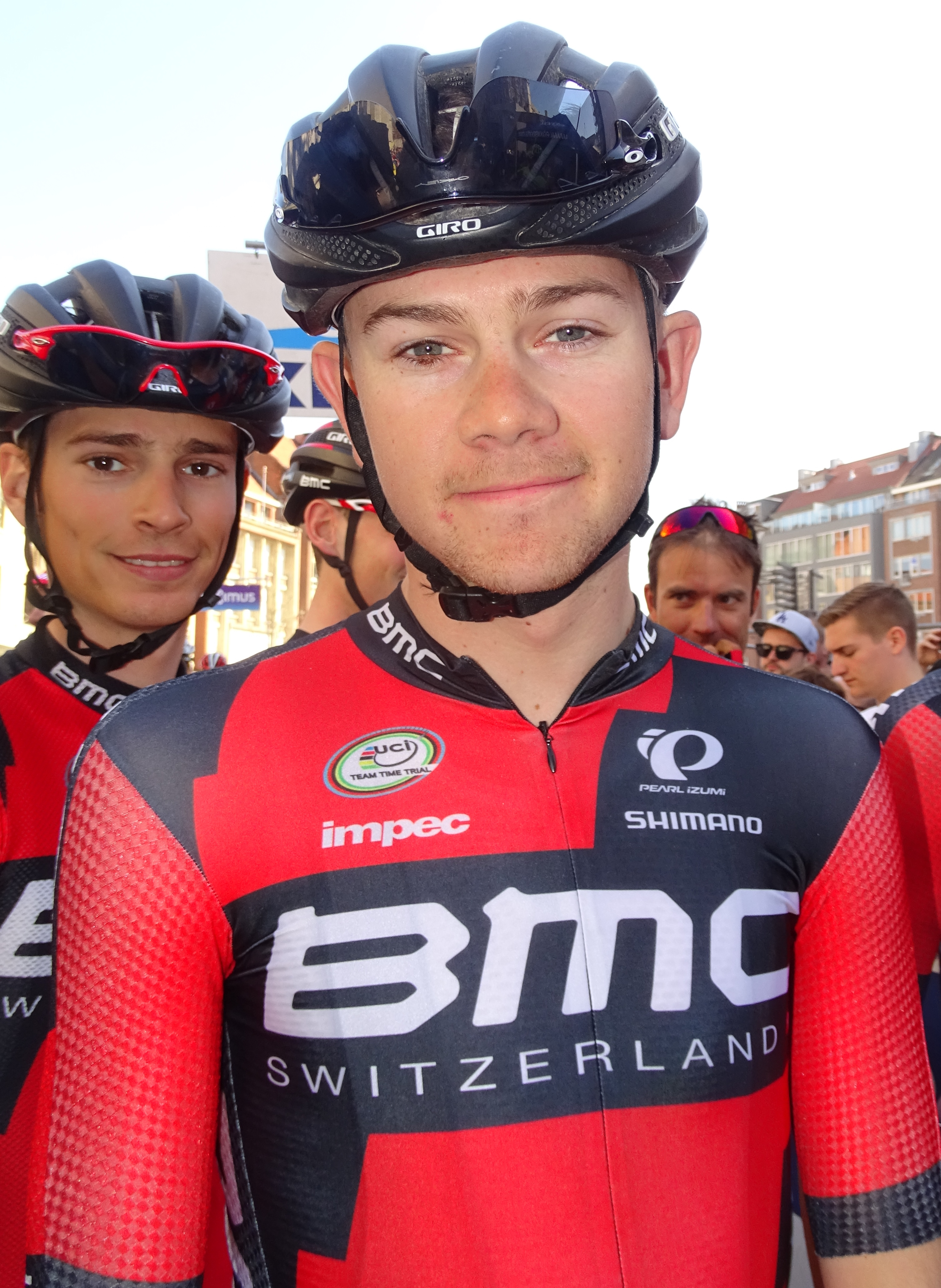 Reportage réalisé le mercredi 15 avril à l'occasion du départ de la Flèche brabançonne 2015 à Louvain, Belgique.